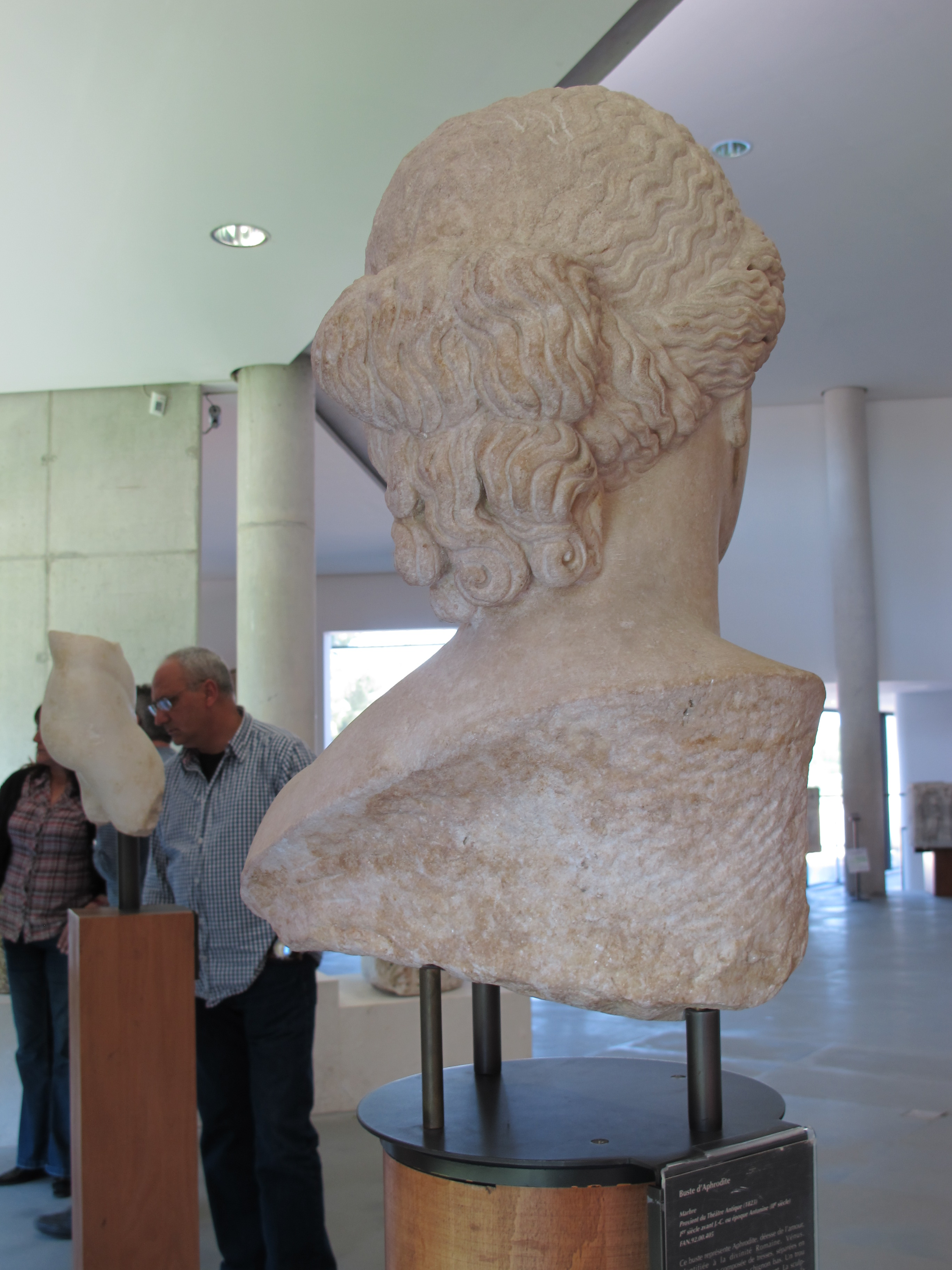 arles 2010